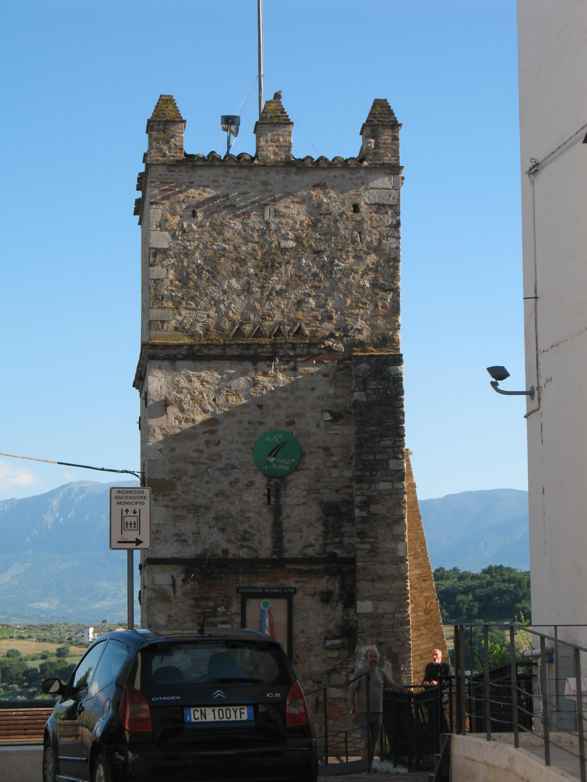 Torre nel paese di Alanno